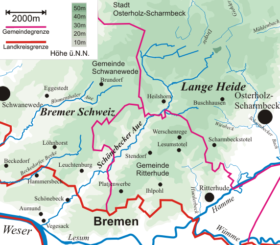 Flusslauf der Schönebecker Aue (Bremen-Nord)